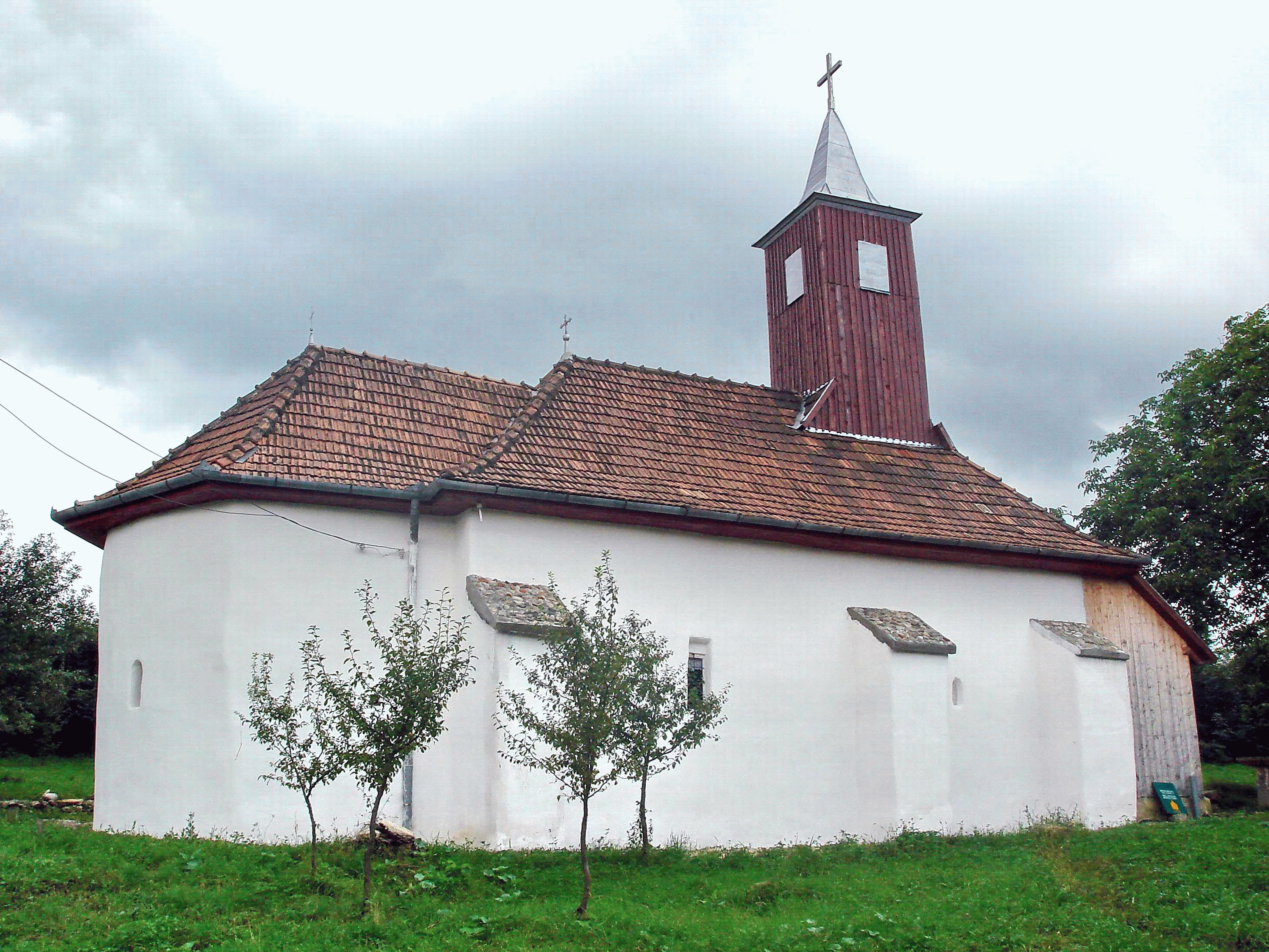 Sănduleşti (judeţ Cluj, România), Biserica Greco-Catolică